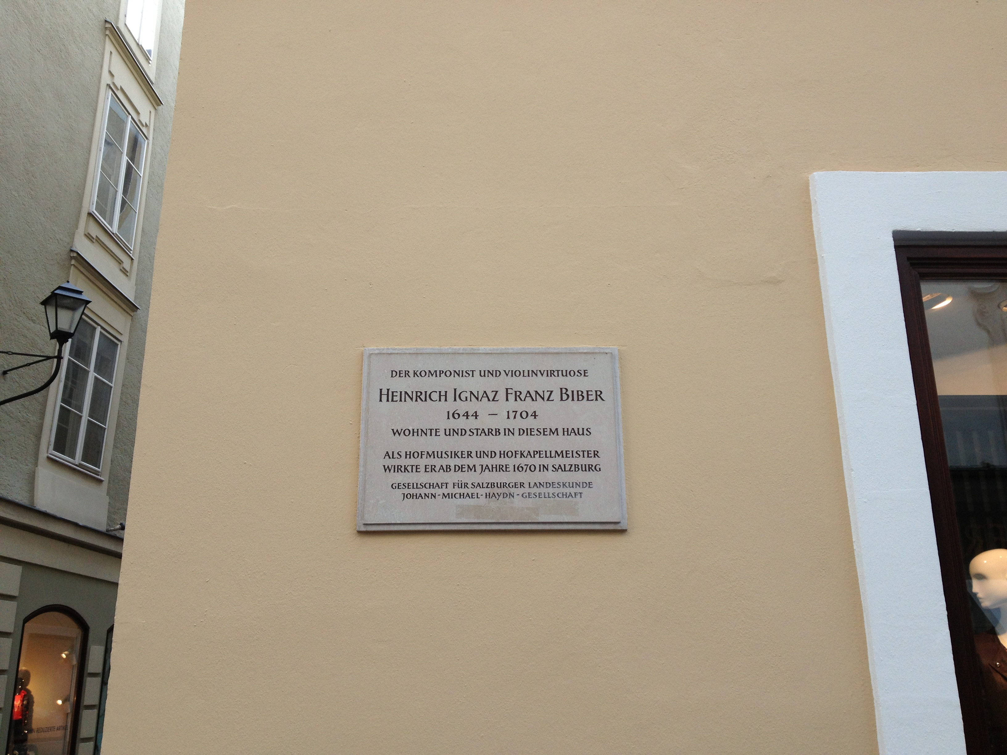 lapide commemorativa del violinista e compositore Heinrich Ignaz Franz Biber